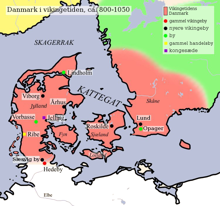 Danmark i vikingetiden, med danske tekster, forebillede "Dänemark Wikingerzeit unbeschriftet"